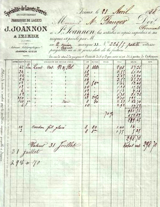 Joseph Joannon, facture, fabrique de lacets ferrés, 1888.